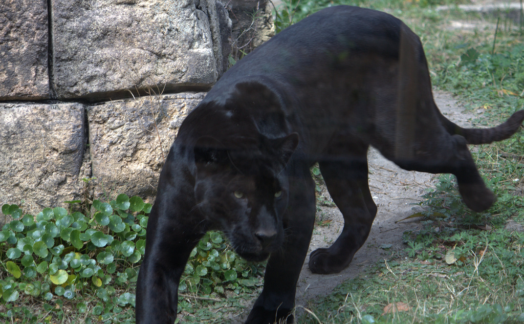 Black jaguar in Jaksonville Zoo and Gardens